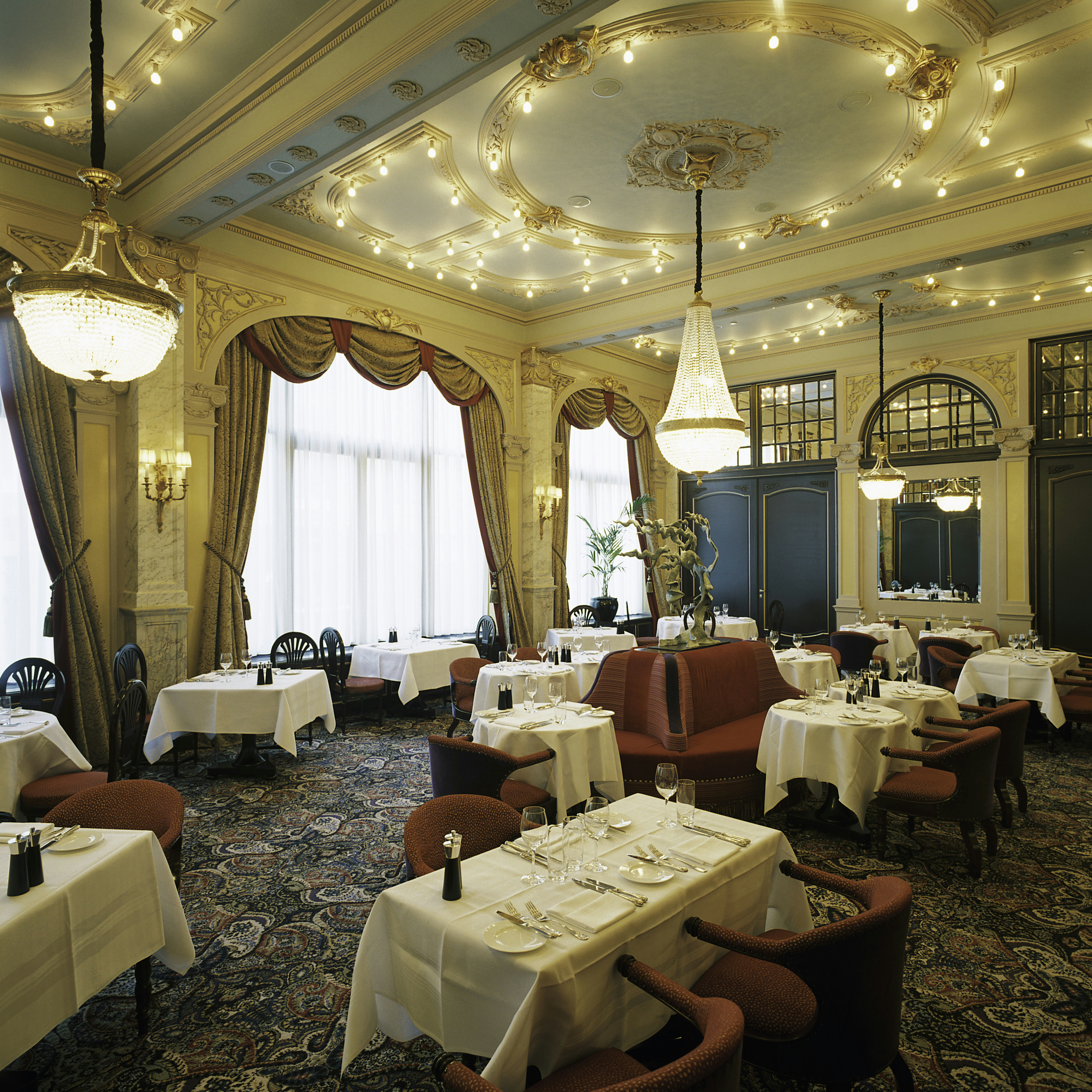 Hotel des Indes: Interieur, overzicht van het restaurant aan de achterzijde